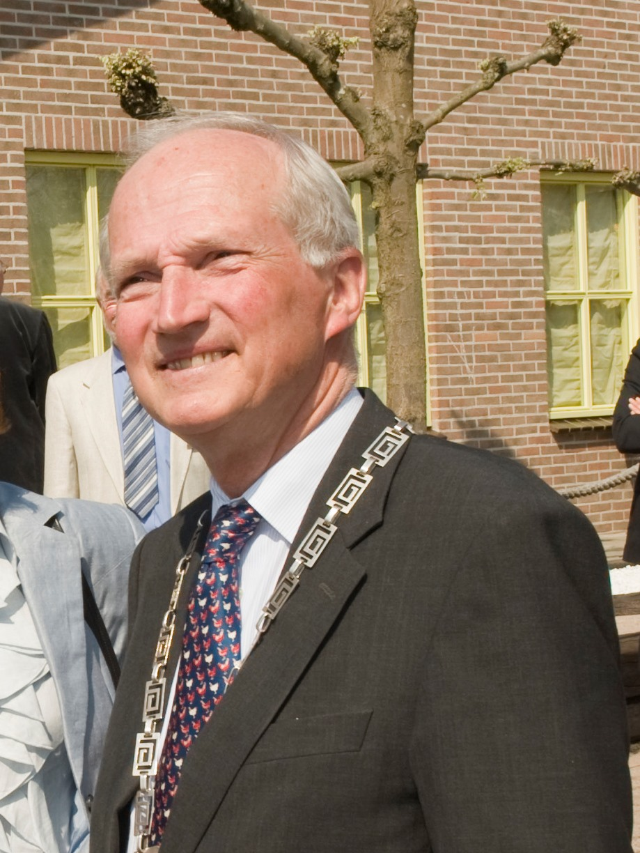 Hugo Schorer (burgemeester Renswoude 1996-2011) in 2011